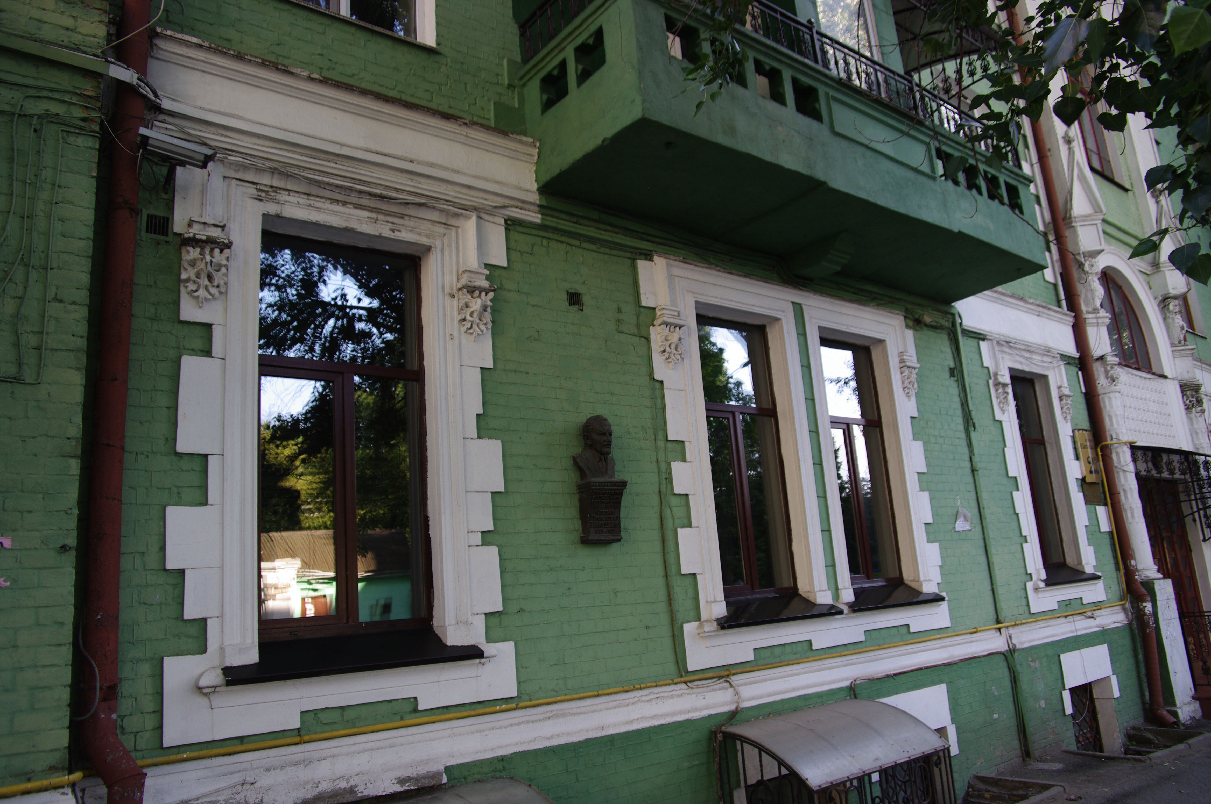 Будинок прибутковий, в якому жив у 1917–1920 рр. Тимошенко С. П., академік, вчений у галузі теорії пружності, який брав участь у розробці законопроекту із заснування УАН у 1918 р., Київ, Гоголівська вул., 23